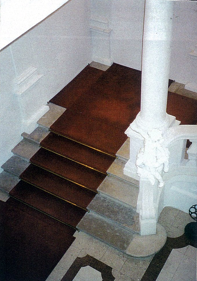 Erzbischöfl._Palais_Treppe1